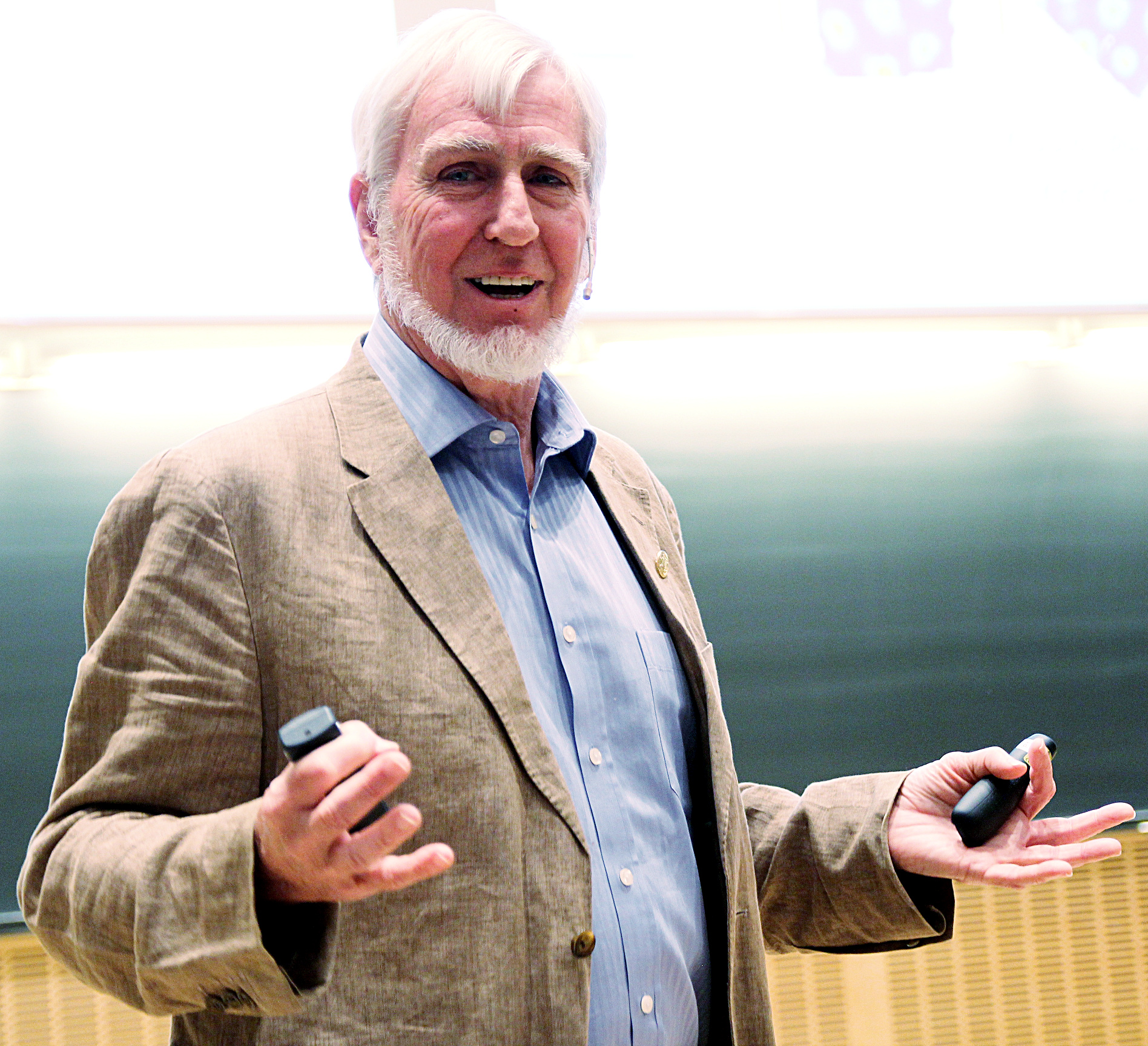 John O'Keefe, Neuroscience Prize Winner.